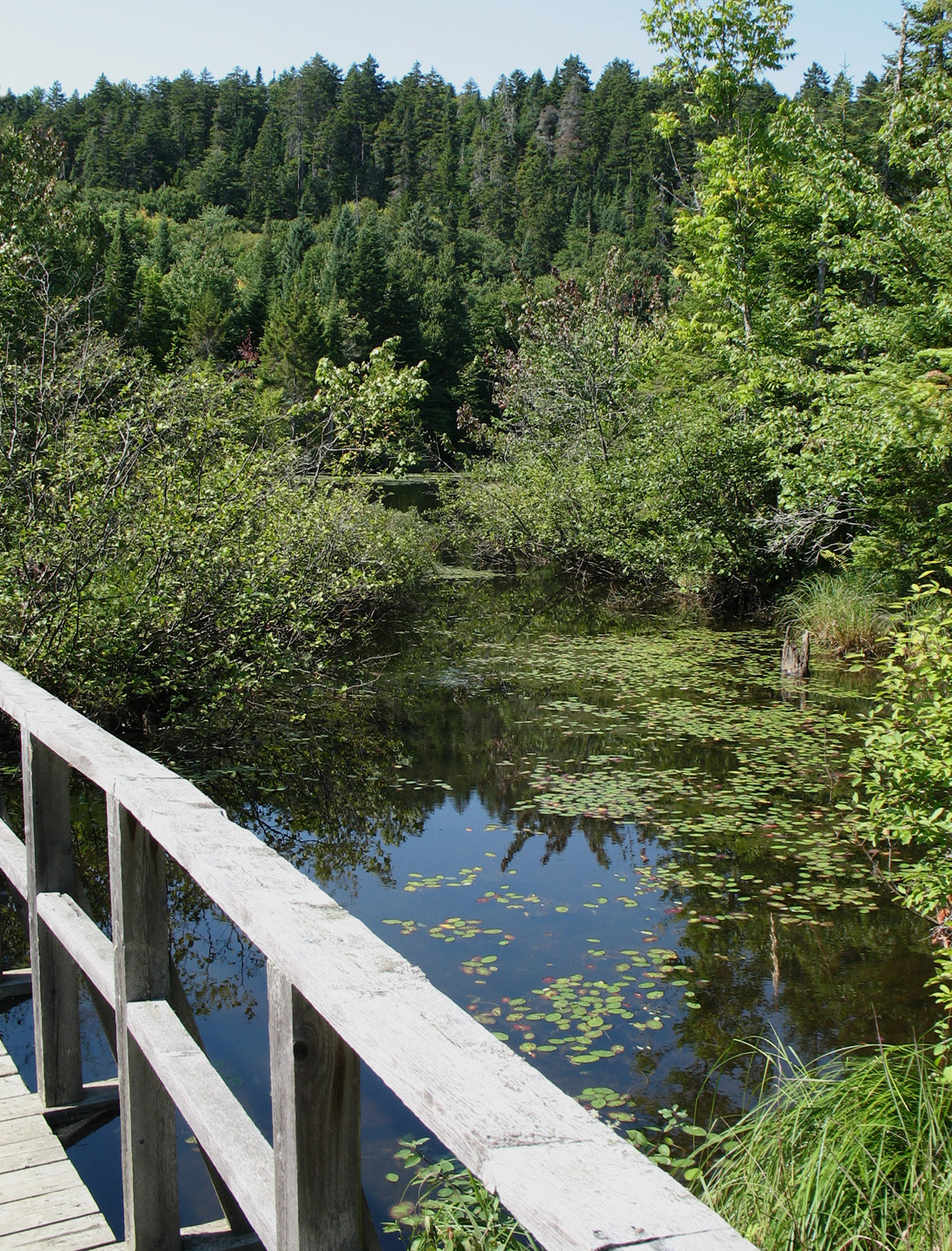 Sentier d'interprétation de la Réserve naturelle des Marais-du-Nord, 1100, chemin de la Grande-Ligne, Stoneham, Province de Québec, Canada. Association pour la protection de l'environnement du lac Saint-Charles et des Marais du Nord (APEL)